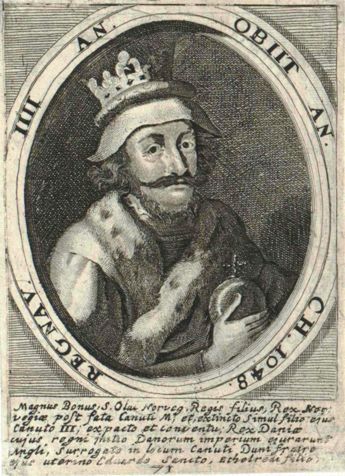 Magnus den Gode måtte hele sin regeringstid kæmpe hårdt for herredømmet over Danmark.